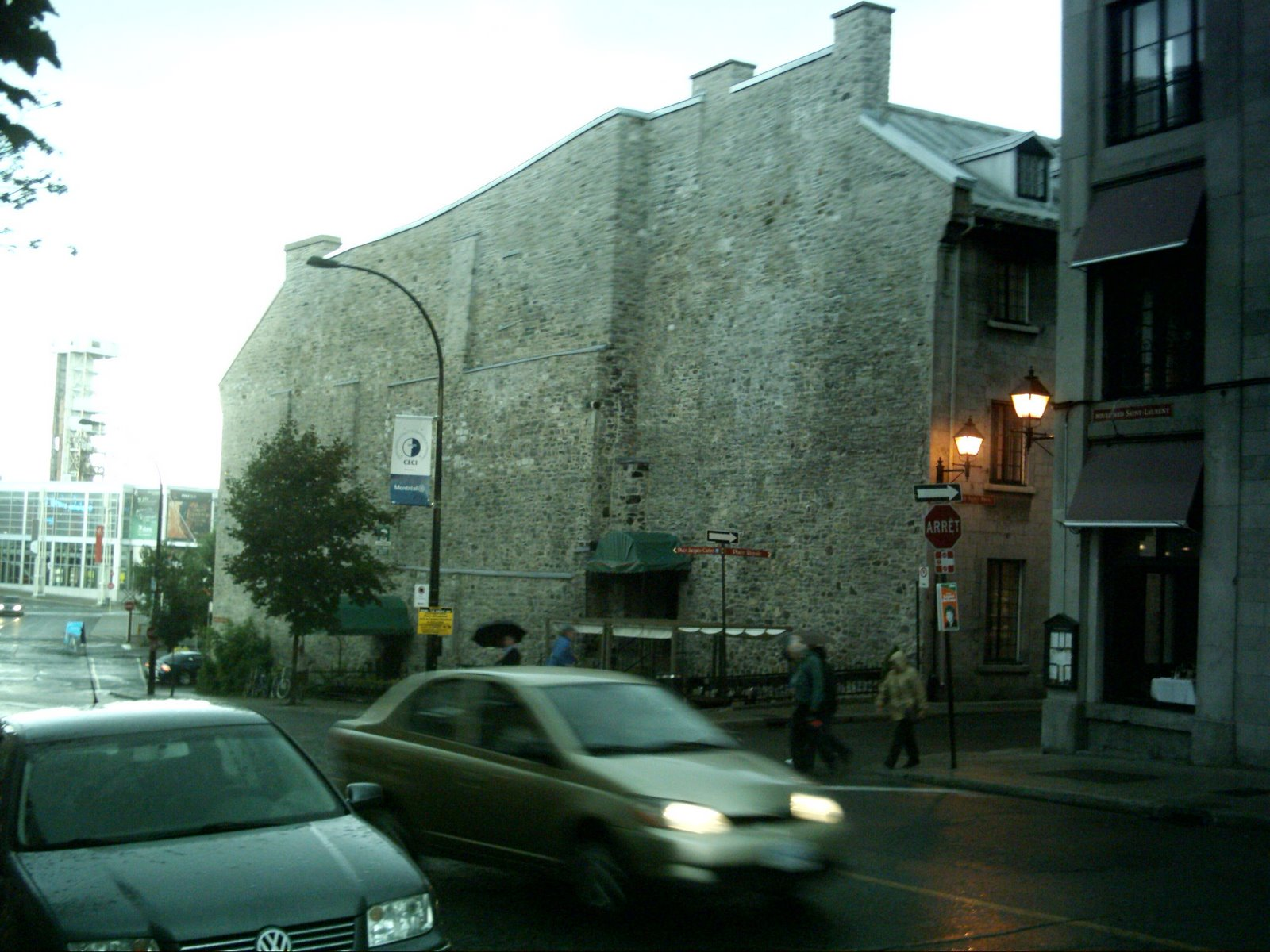 À l'angle du boulevard Saint-Laurent et de la rue Saint-Paul, on voit ce mur qui nous rappelle qu'on a dû sectionner le pâté de maison pour laisser passer le boulevard jusqu'à la rue de la Commune.